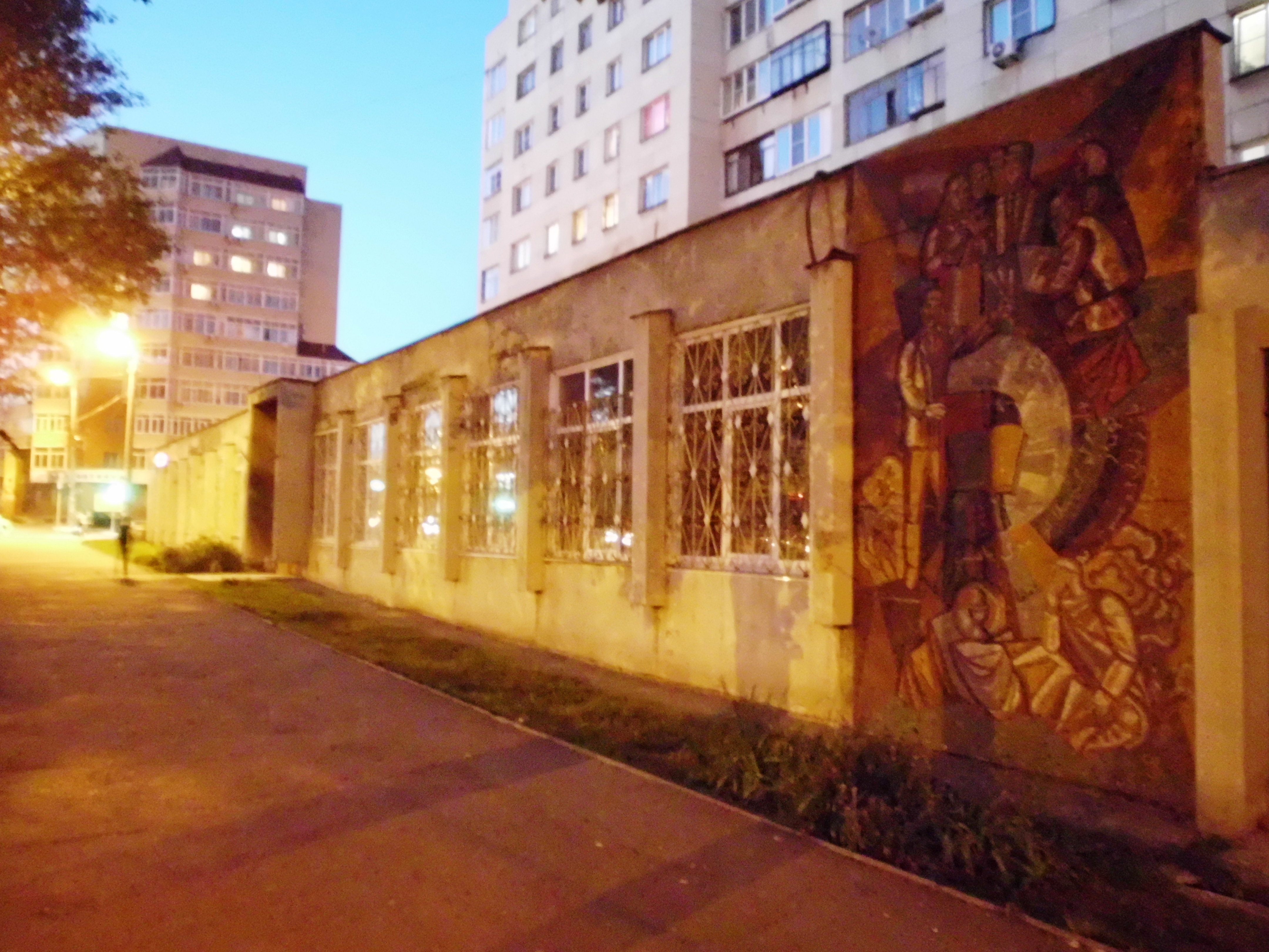 Библиотека № 15 башкирской и татарской литературы имени Шайхзады Бабича в городе Челябинске по ул. Цвиллинга, 61. Также в этой части здания располагается отдел иностранной литературы Челябинской областной универсальной научной библиотеки.